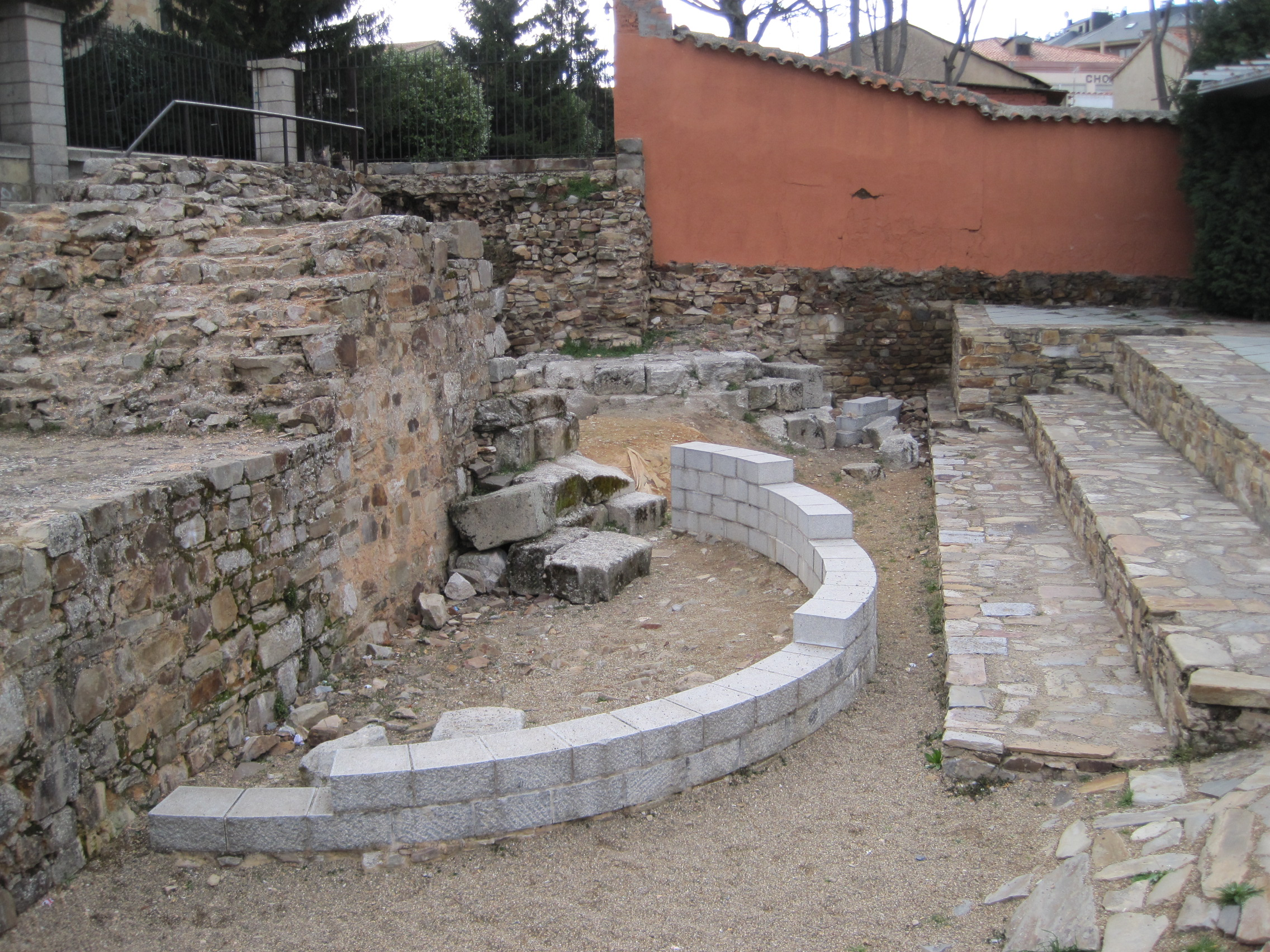 Vista de los restos de una de las puertas de la muralla romana de Astorga (León, España).